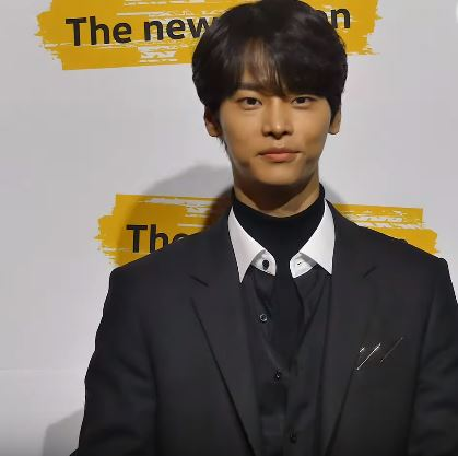 6일 오후 서울시 강남구 신사동 '폭스바겐 아트 & 라이프 스타일 하우스'에서 디 아테온(The Art:eon) 런칭 행사가 열렸다. 이날 이동욱, 김동욱, 빅스 엔(차학연), 강기영이 참석해 포토타임에서 포즈를 취하고 있다.